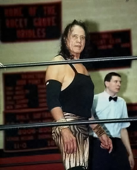 Wrestling legend Jimmy Snuka on 3/28/09 from Franklin PA